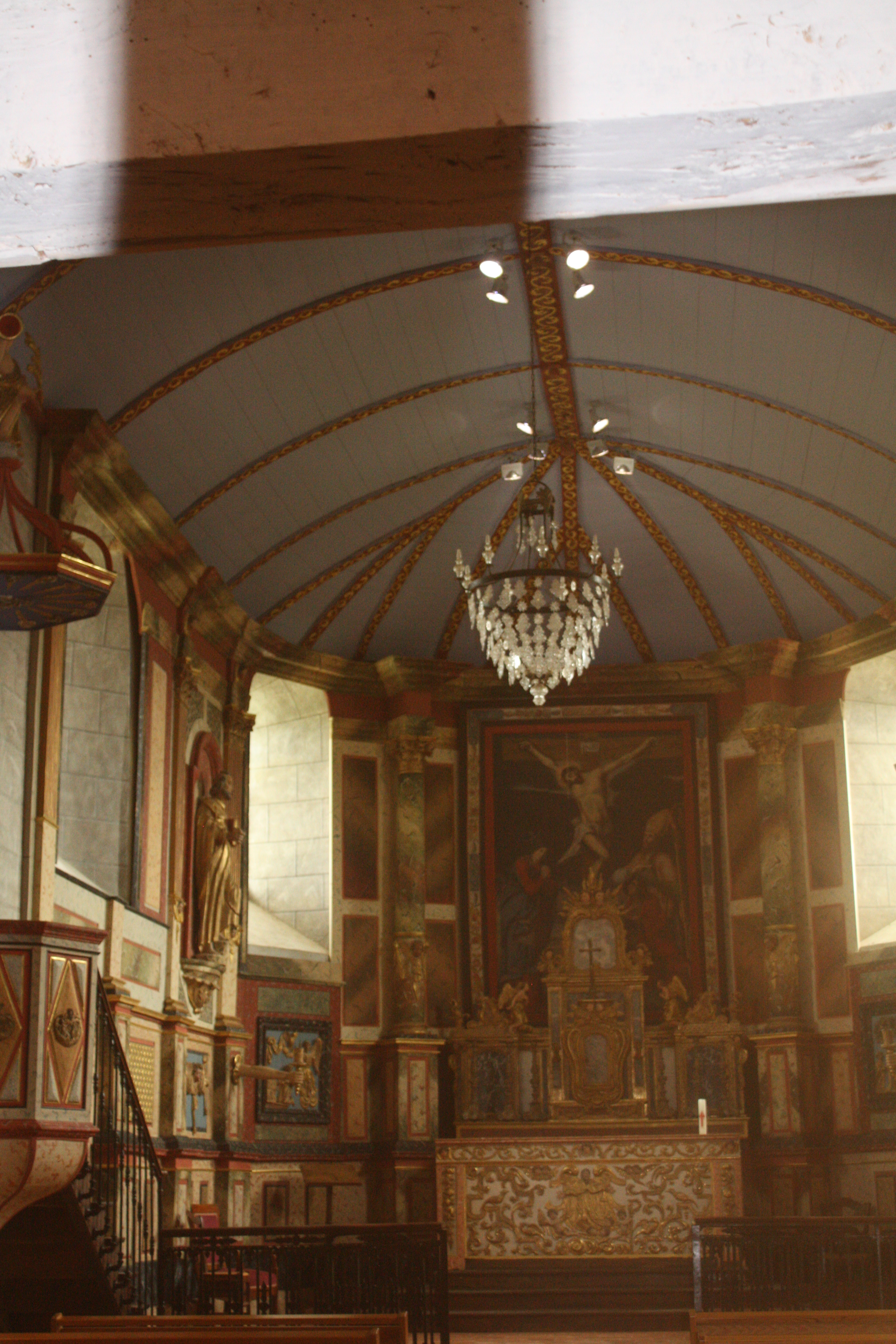 Église Saint-Orens d'Escurès